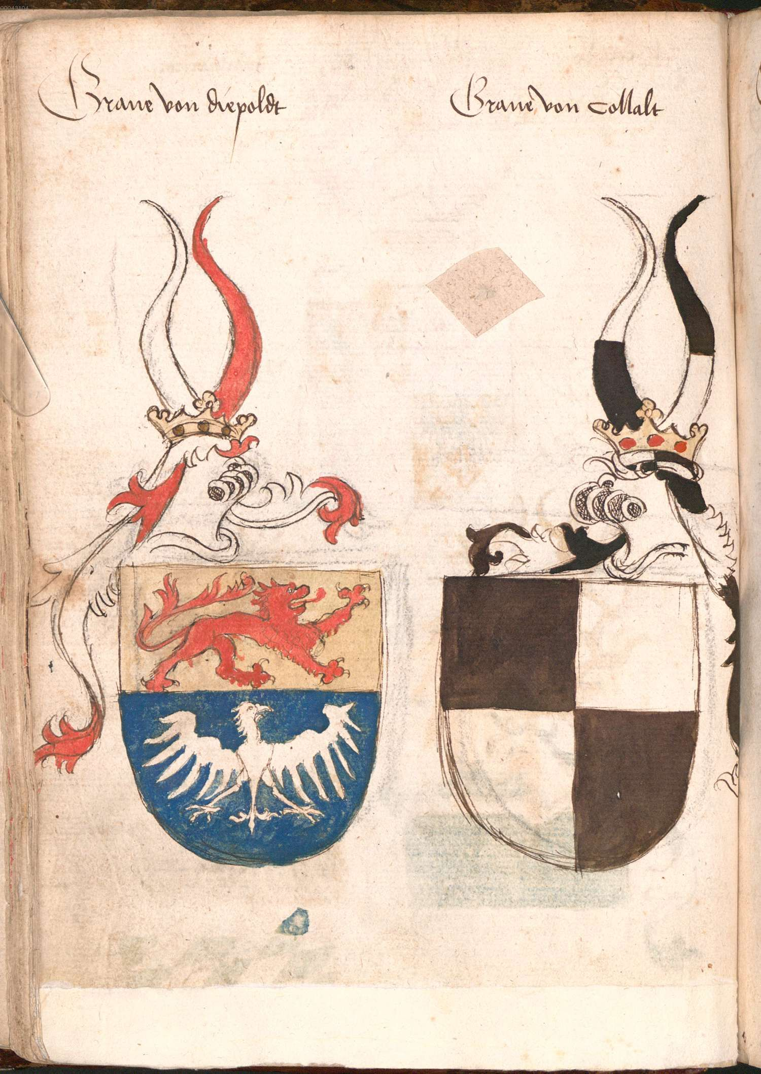 „Wernigeroder (Schaffhausensches) Wappenbuch“; Süddeutschland 4. Viertel 15. Jh. Bayerische Staatsbibliothek München, Cod.icon. 308 n Graue von diepoldt (Graf von Diepholz) Graue von collalt (Collalto???)